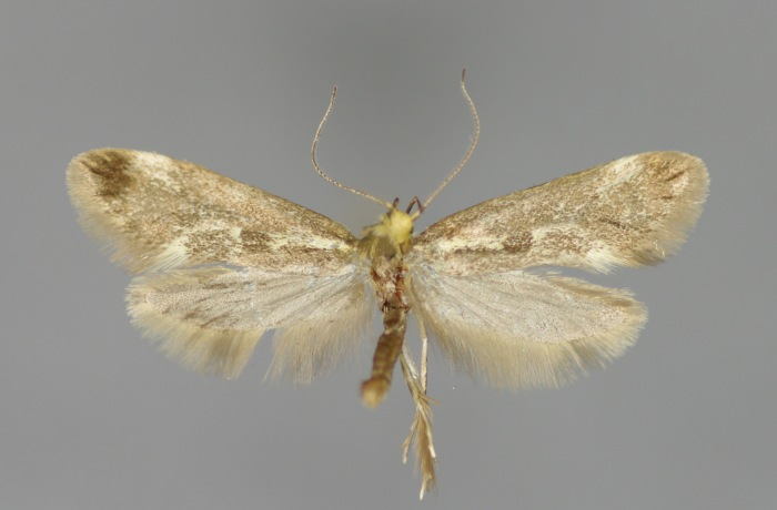 Denisia stipella